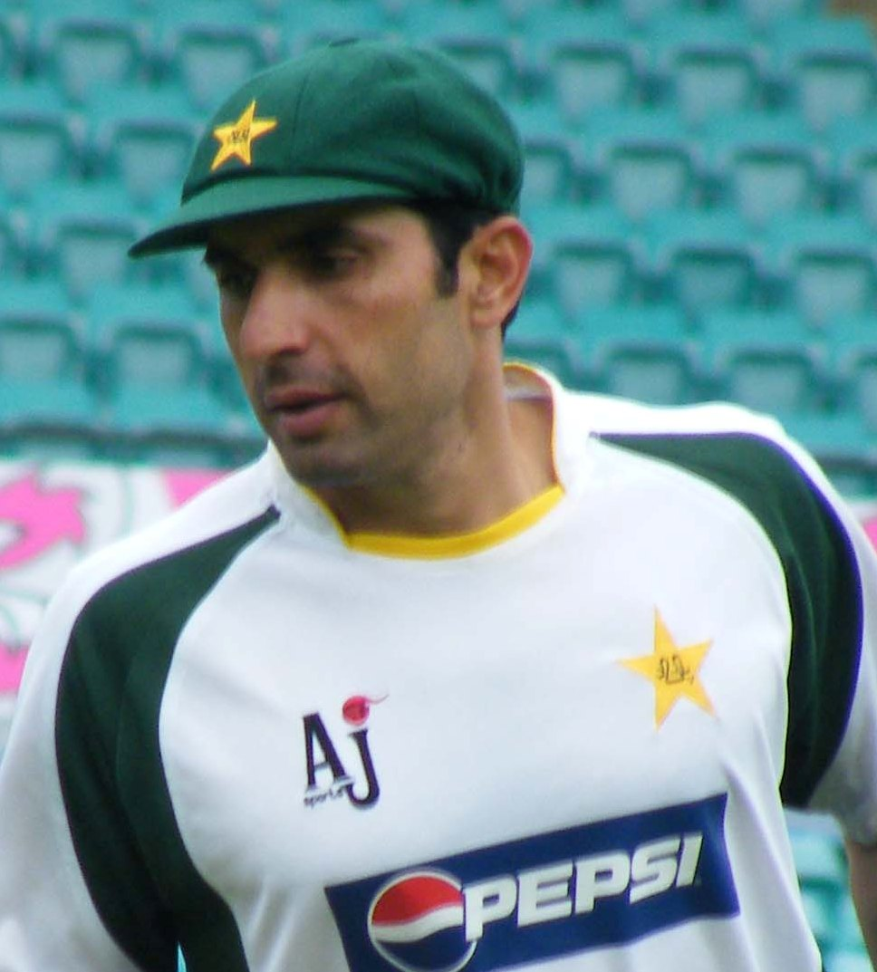 Misbah Ul-Haq of Pakistan